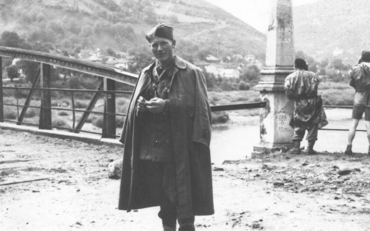 Srpskohrvatski / српскохрватски: Milan Žeželj, komandant 13. proleterske brigade, u istočnoj Bosni 1944.